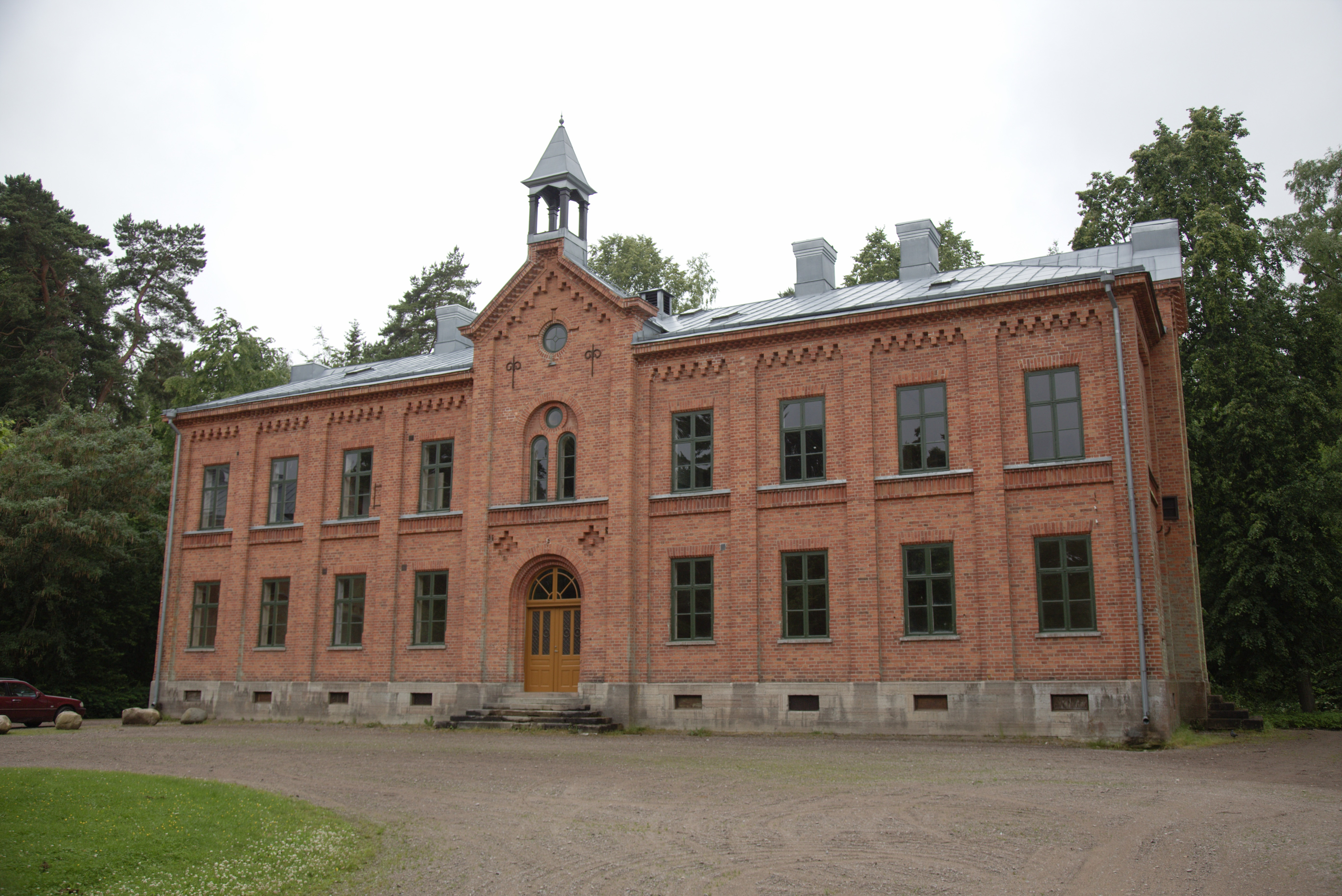 Karlsborgs Garnisonssjukhus. Västra byggnaden.